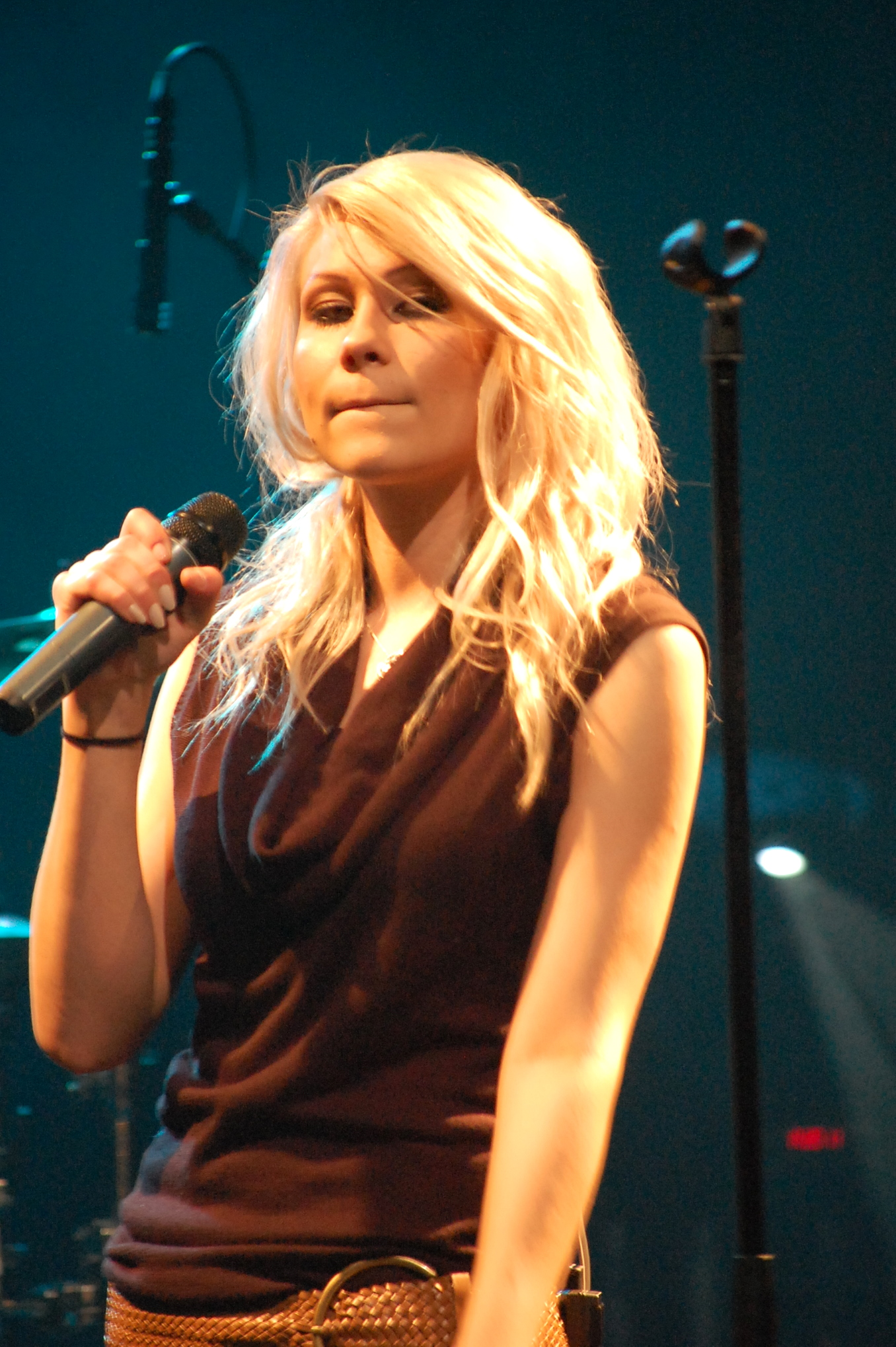 Tiedoston tiedot Kuvaus = Kristiina Brask Lähde = itse otettu Päiväys = Tekijä = Mika Heikkinen Tekijänoikeuksien haltija =